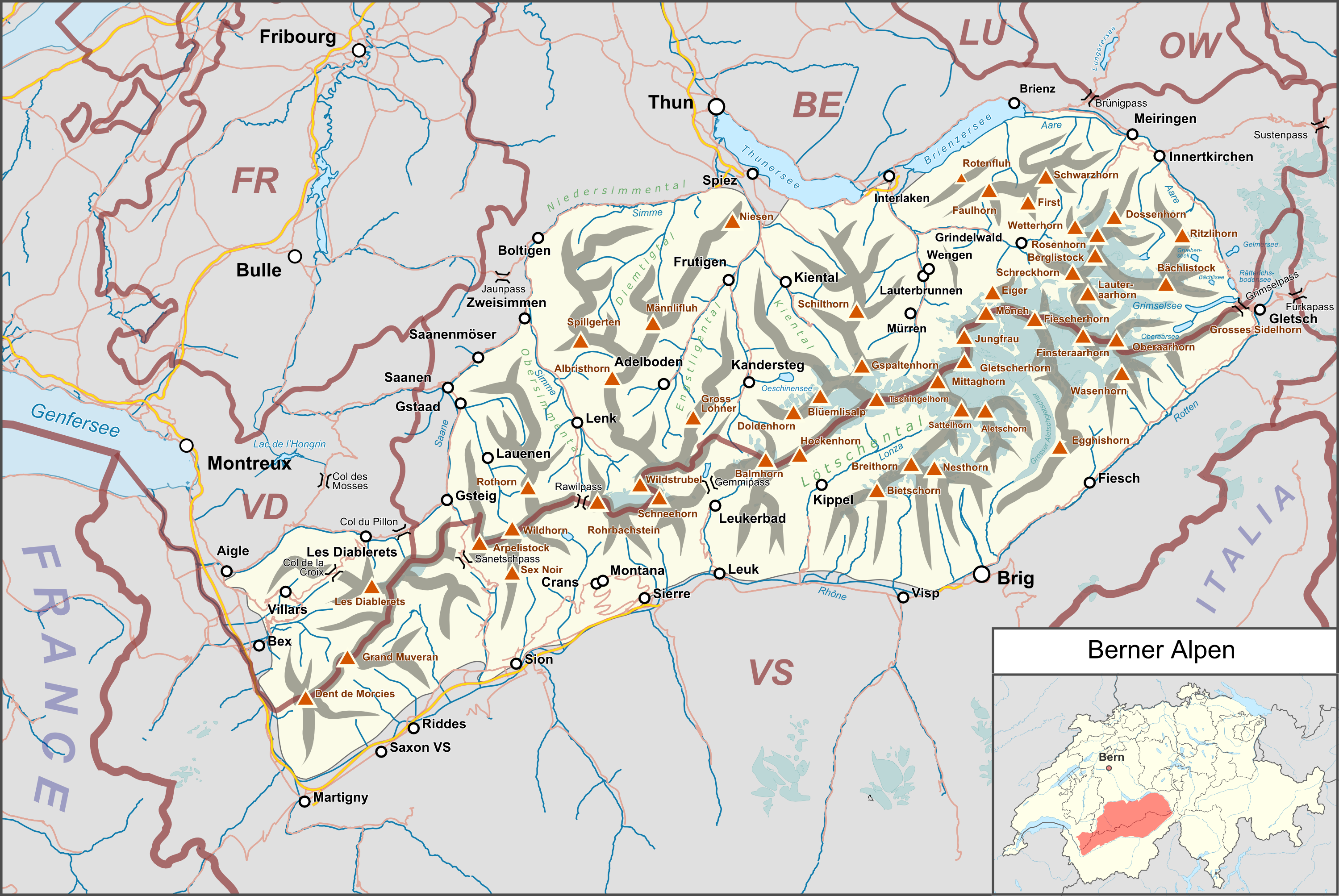 Lagekarte der Berner Alpen